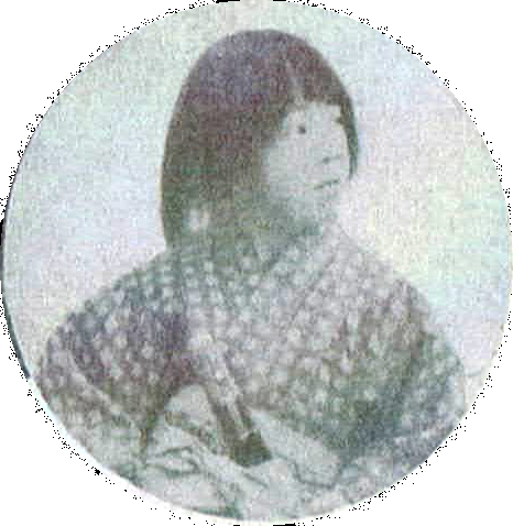 歌舞伎出版部『歌舞伎 第2年』第4号臨時増刊（1926）より小藤田正一